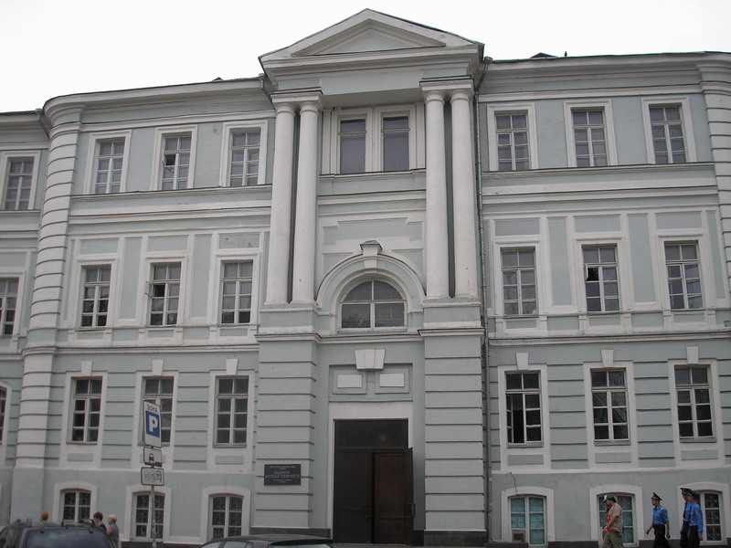 NazarSuhotaBuld1.jpg: Будинок Назарія Сухоти